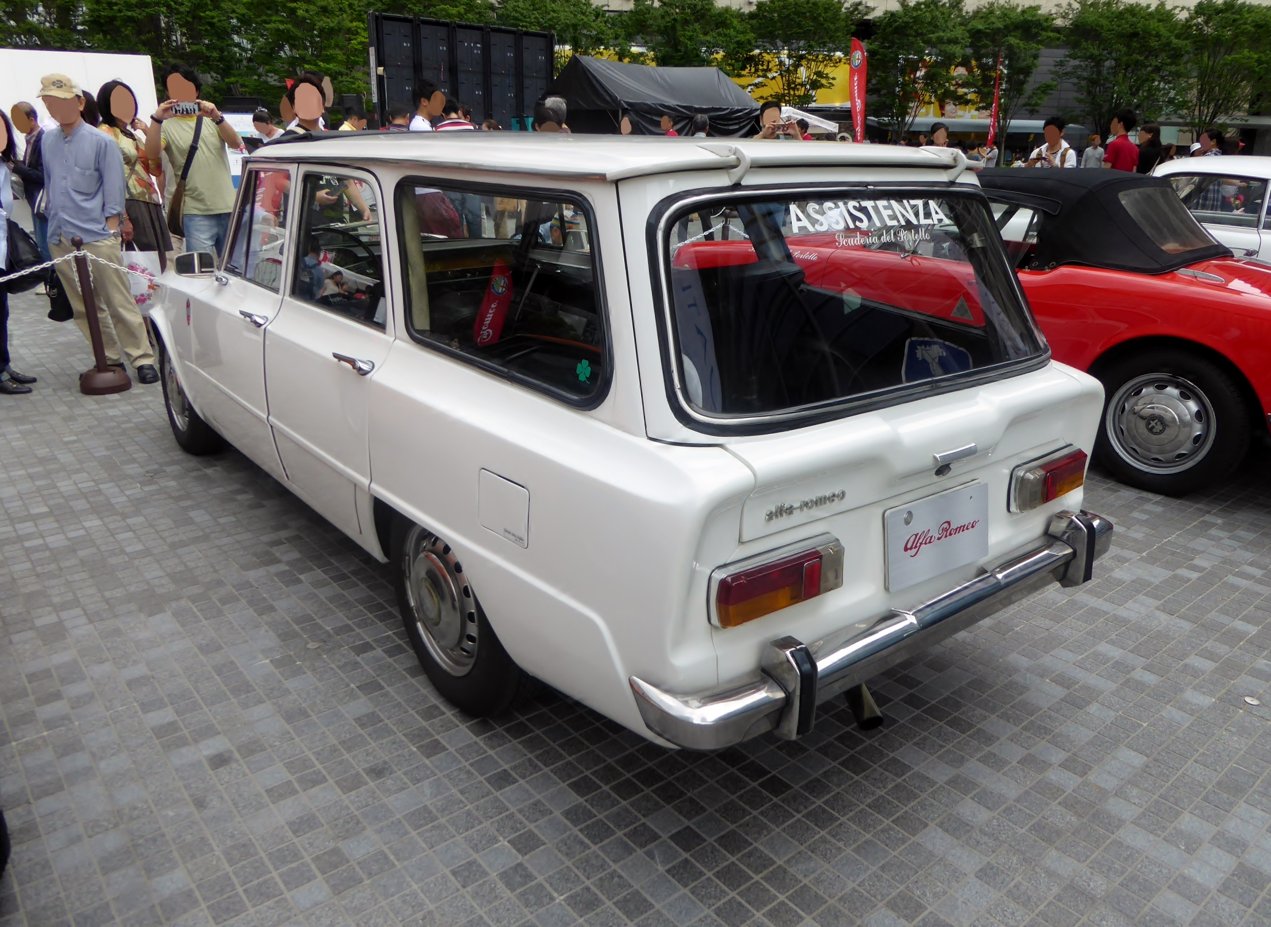 アルファロメオ・ジュリエッタジャルディネッタをリアから撮影。